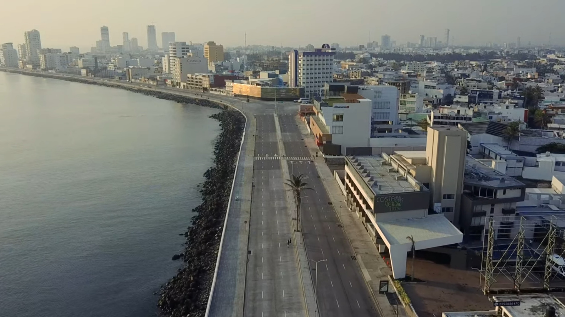 Fotografía del Boulevard Manuel Ávila Camacho en Veracruz vacío por la cuarentena.